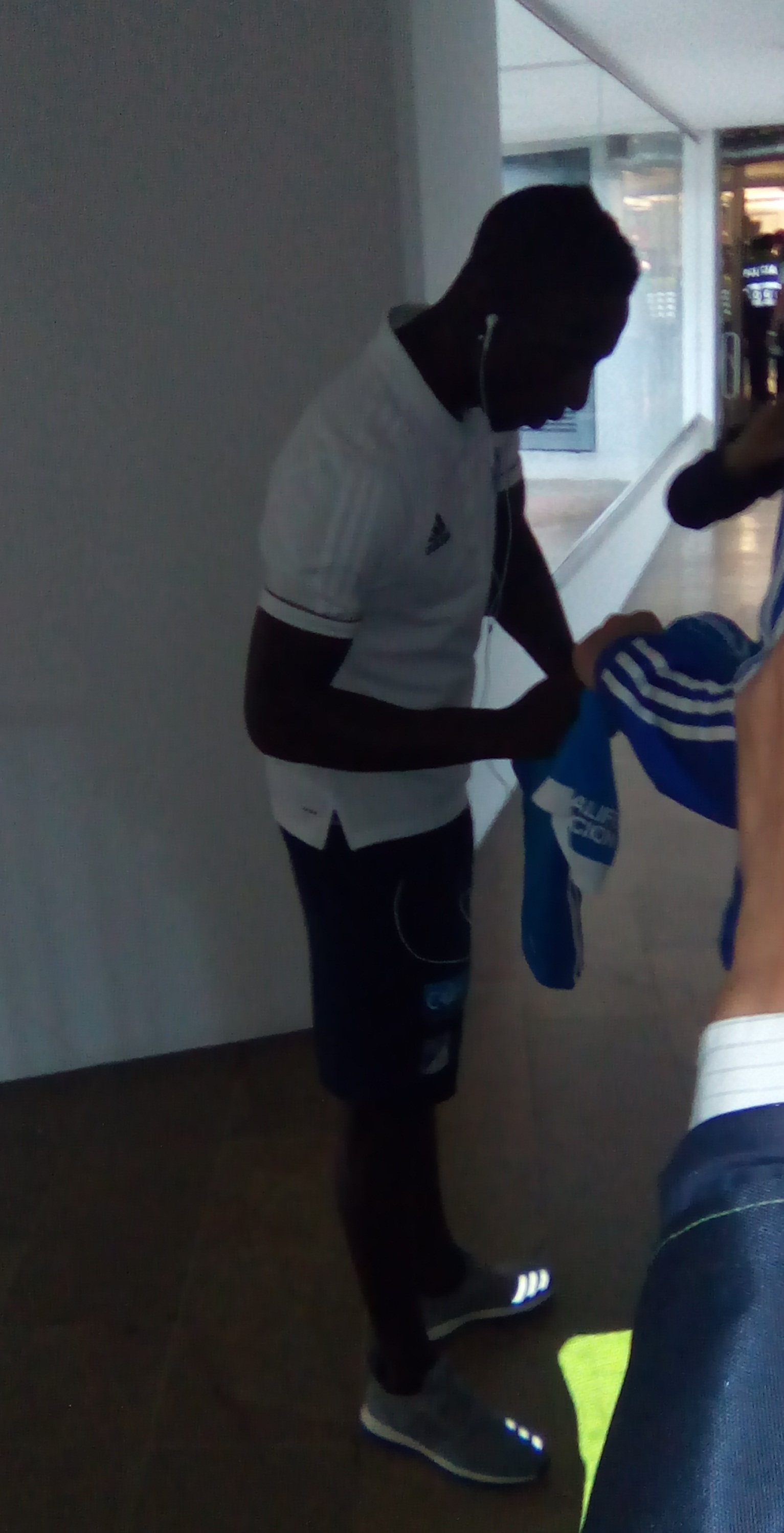 Deiver Machdo con Millonarios.